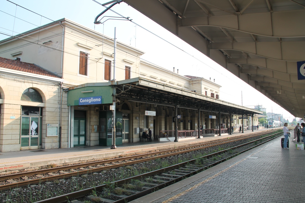 Stazione di Conegliano